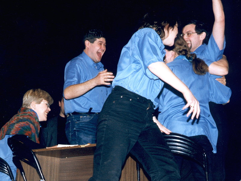 Команда Губанова только что ответила на решающий вопрос III чемпионата России по «Что? Где? Когда?». 16 февраля 2003 года, Московский городской дворец детского (юношеского) творчества.